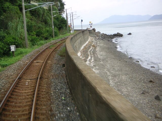 肥後二見駅-上田浦駅間 投稿者が撮影(2004/09/06)